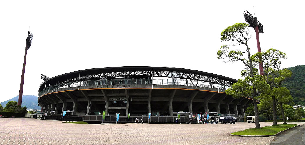 2006年6月11日(香川対徳島)投稿者により撮影されました。 2006年6月22日 (木) 11:14 . . Gomurafuji . . 1050×500 (124,283 バイト)